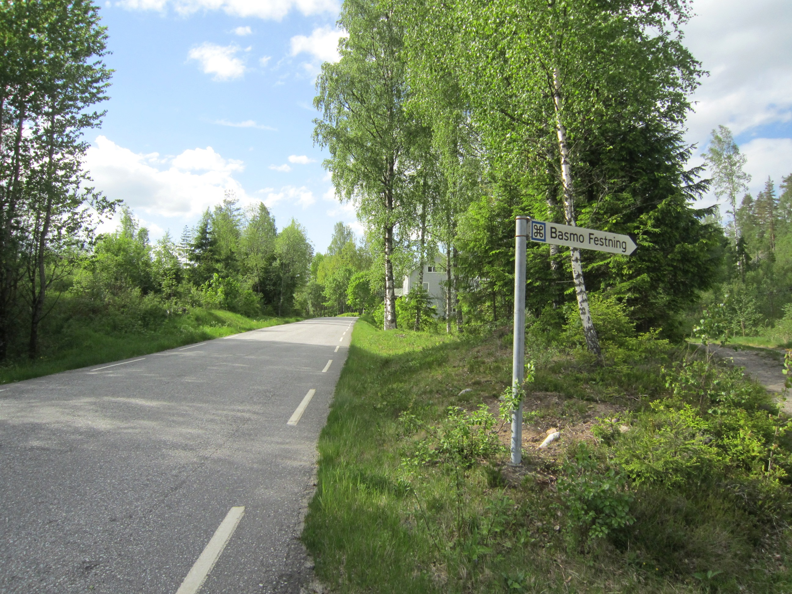 Primær fylkesvei 123 like ved Basmo festning